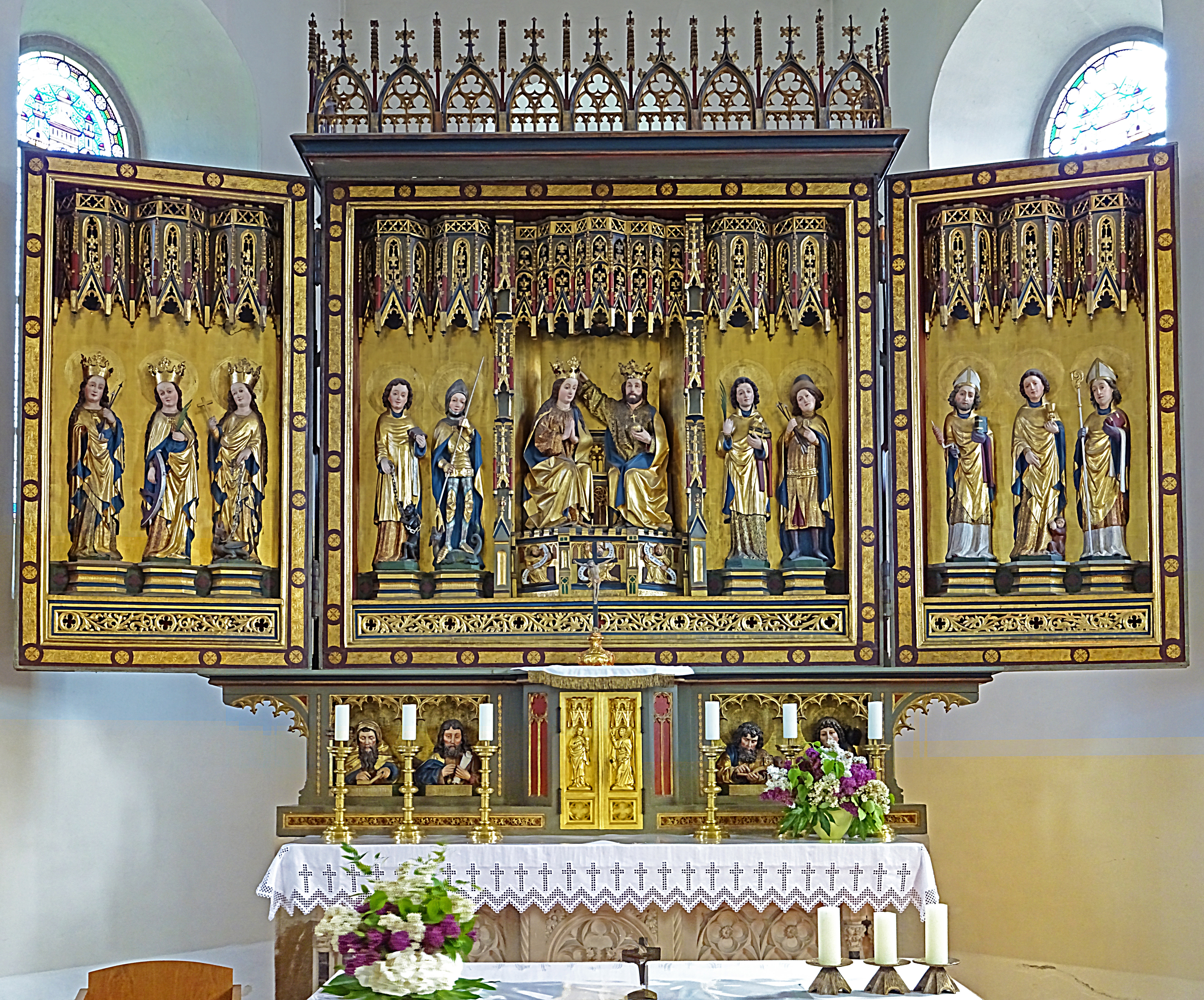 Der spätgotische Schnitzaltar aus der 1803 aufgehoben Klosterkirche Reifenstein wurde 1805 in der Dorfkirche St. Georg (Günterode) eingebaut.